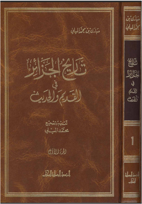 واجهة الكتاب ج1